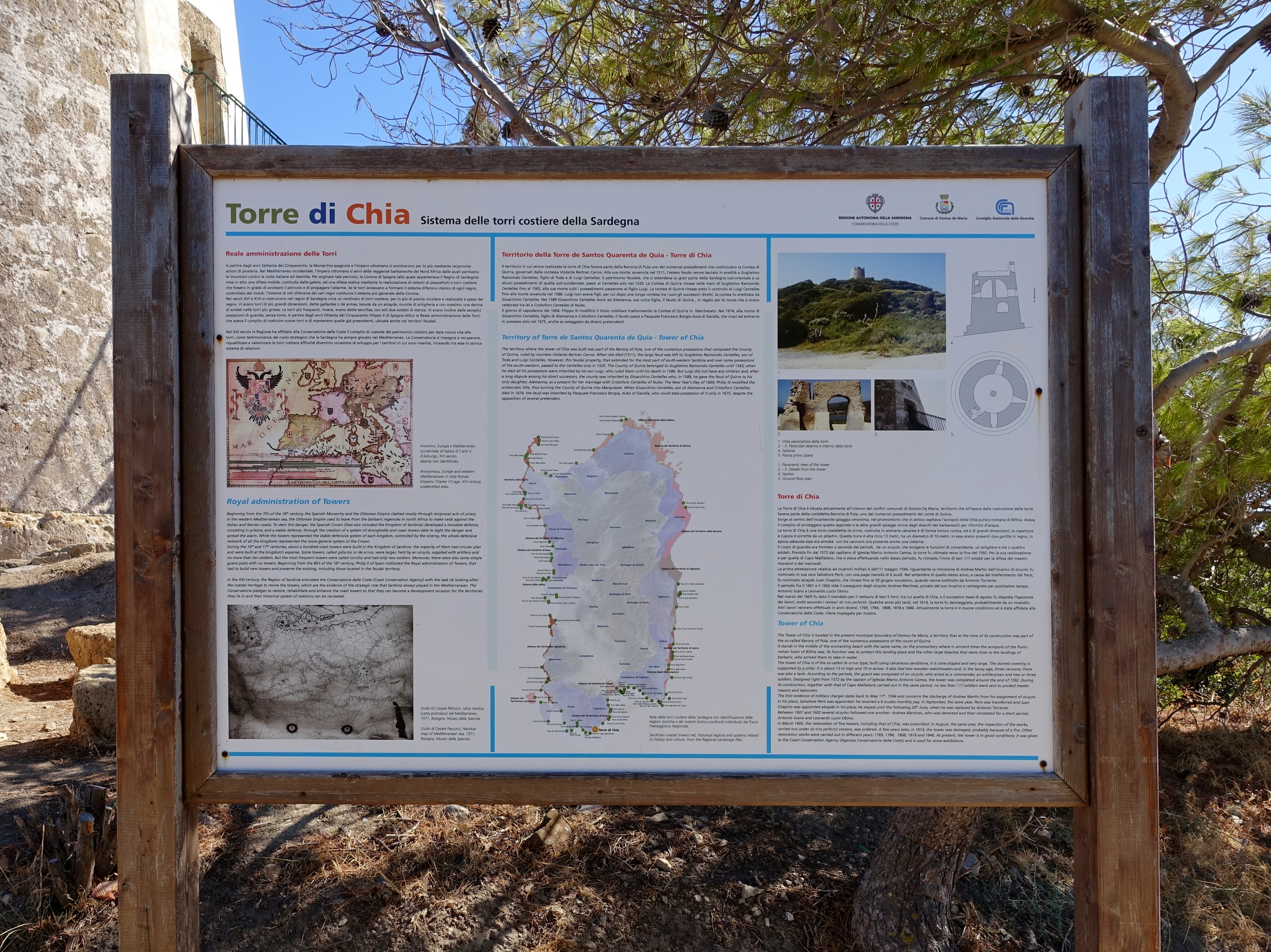 Informationstafel am Turm von Chia (Torre di Chia), Gemeinde Domus de Maria, Sardinien, Italien